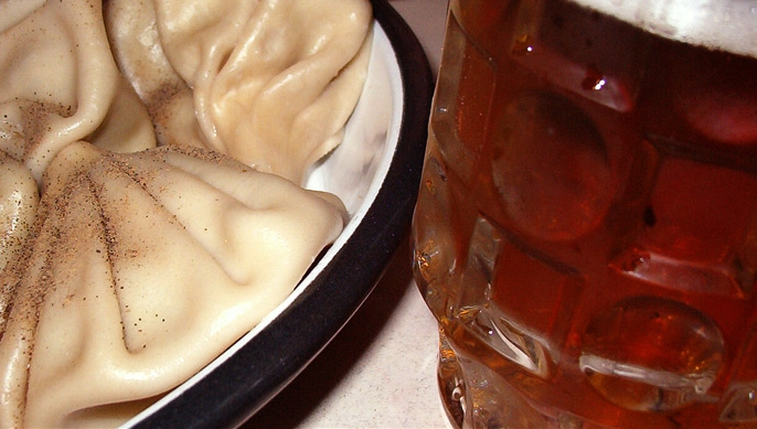 Georgische Küche: Teigtaschen mit Hackfleischfüllung (Chinkali), Glas Bier